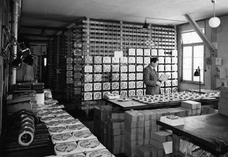 Februar 1954 Furtwangen/Schwarzwald Badische Uhrenfabrik